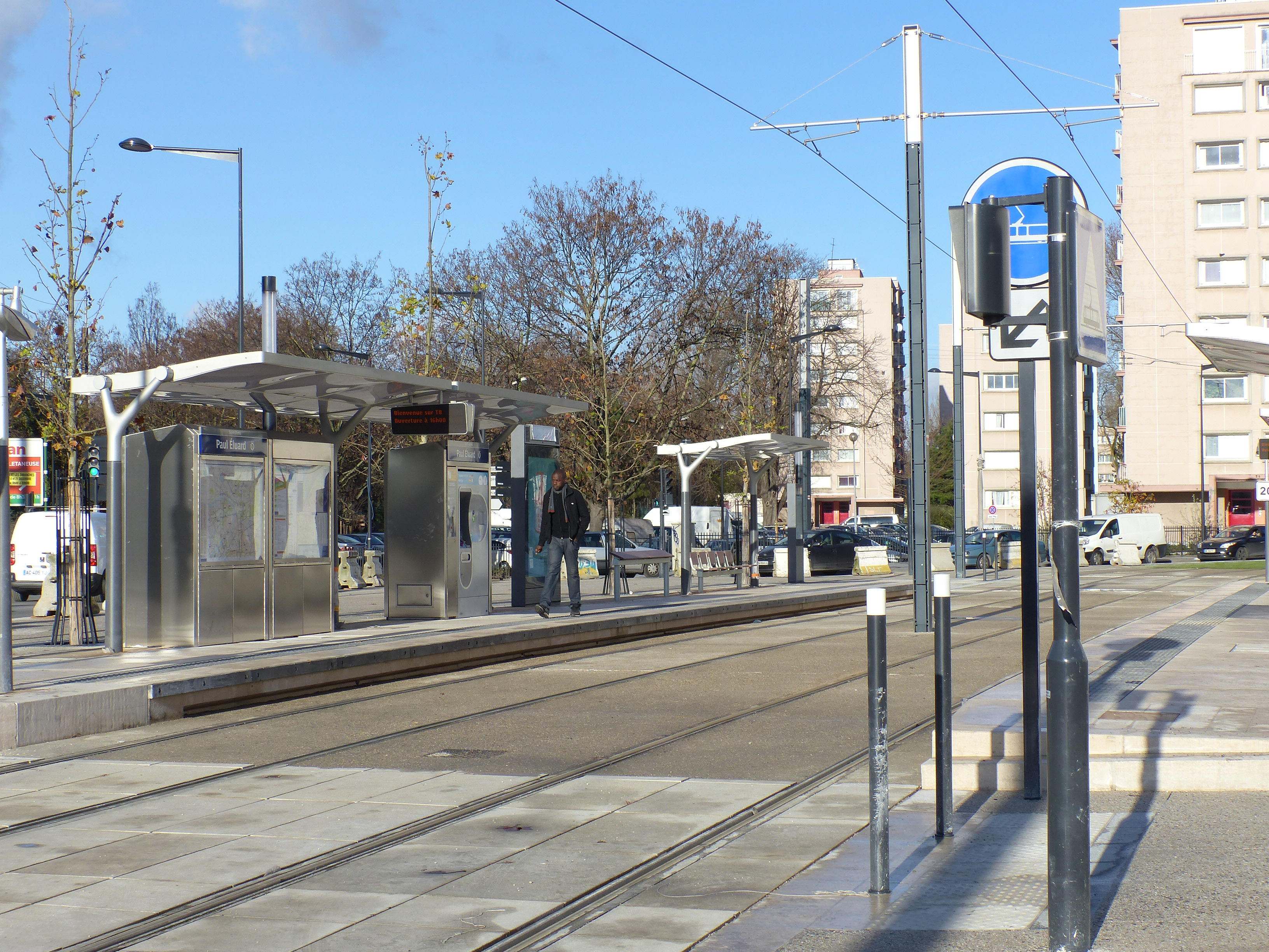 Station Paul-Eluard de T8